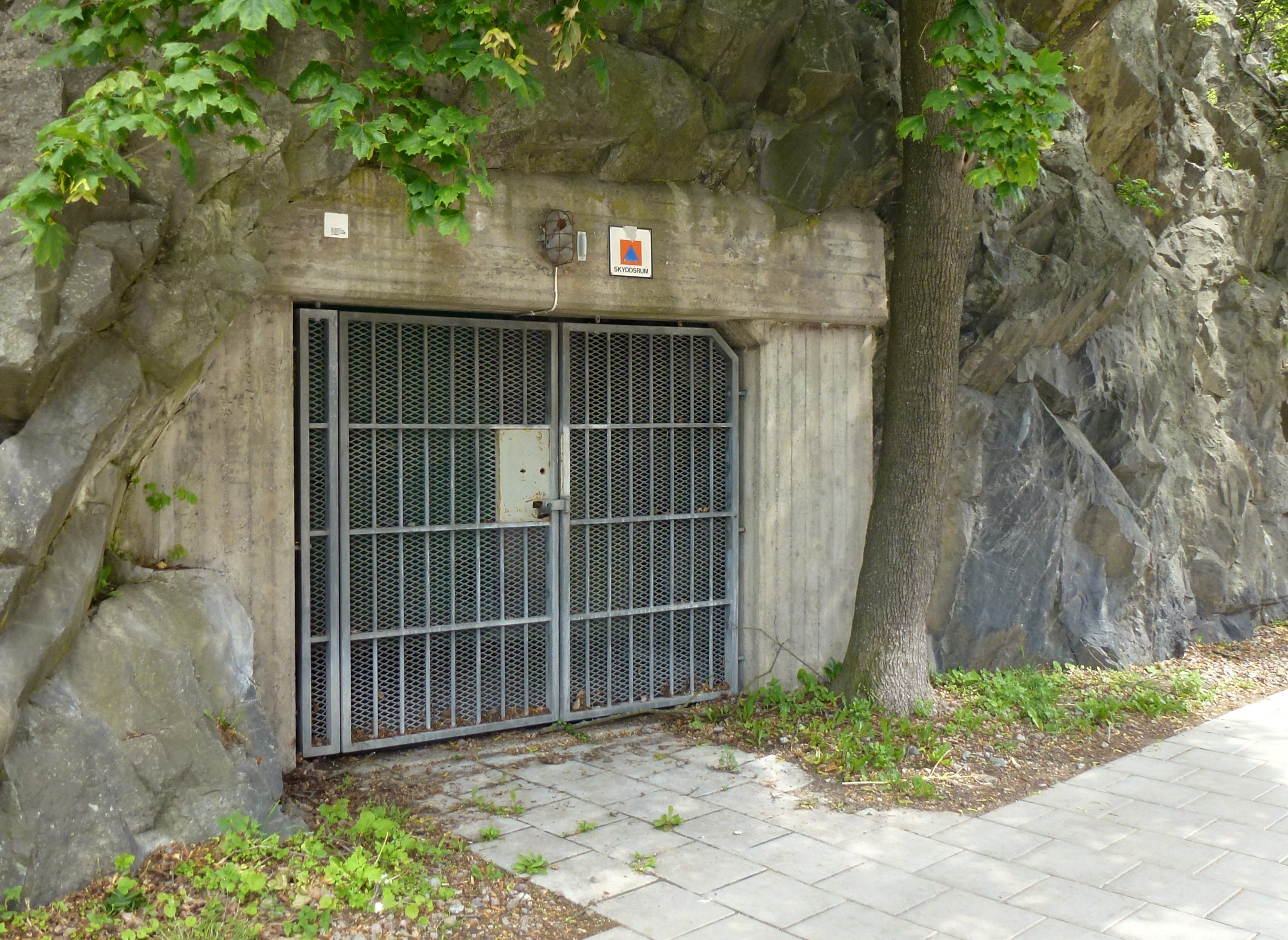 Skyddsrum Torsgatan, entré